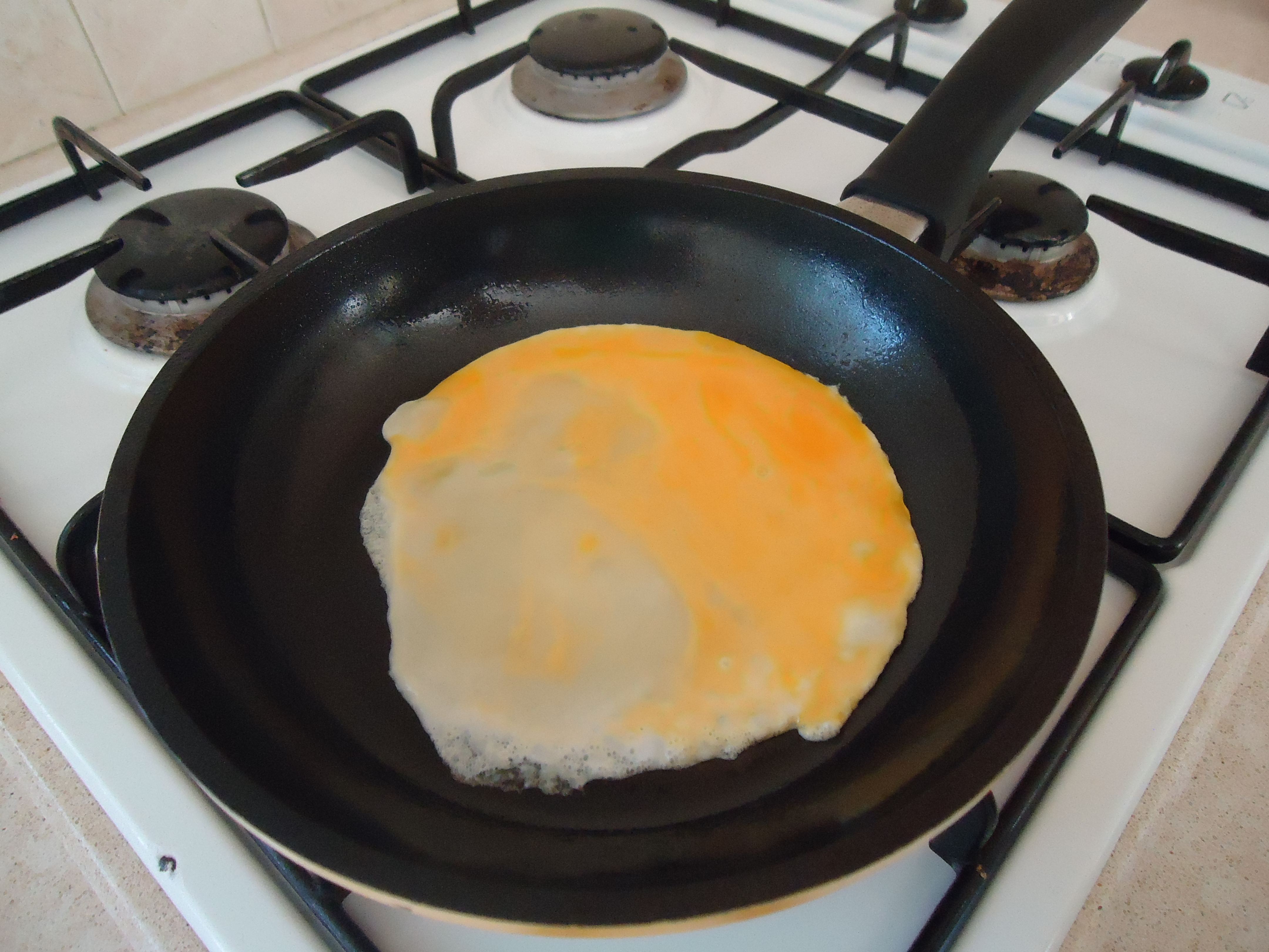 חביתה באמצע הטיגון